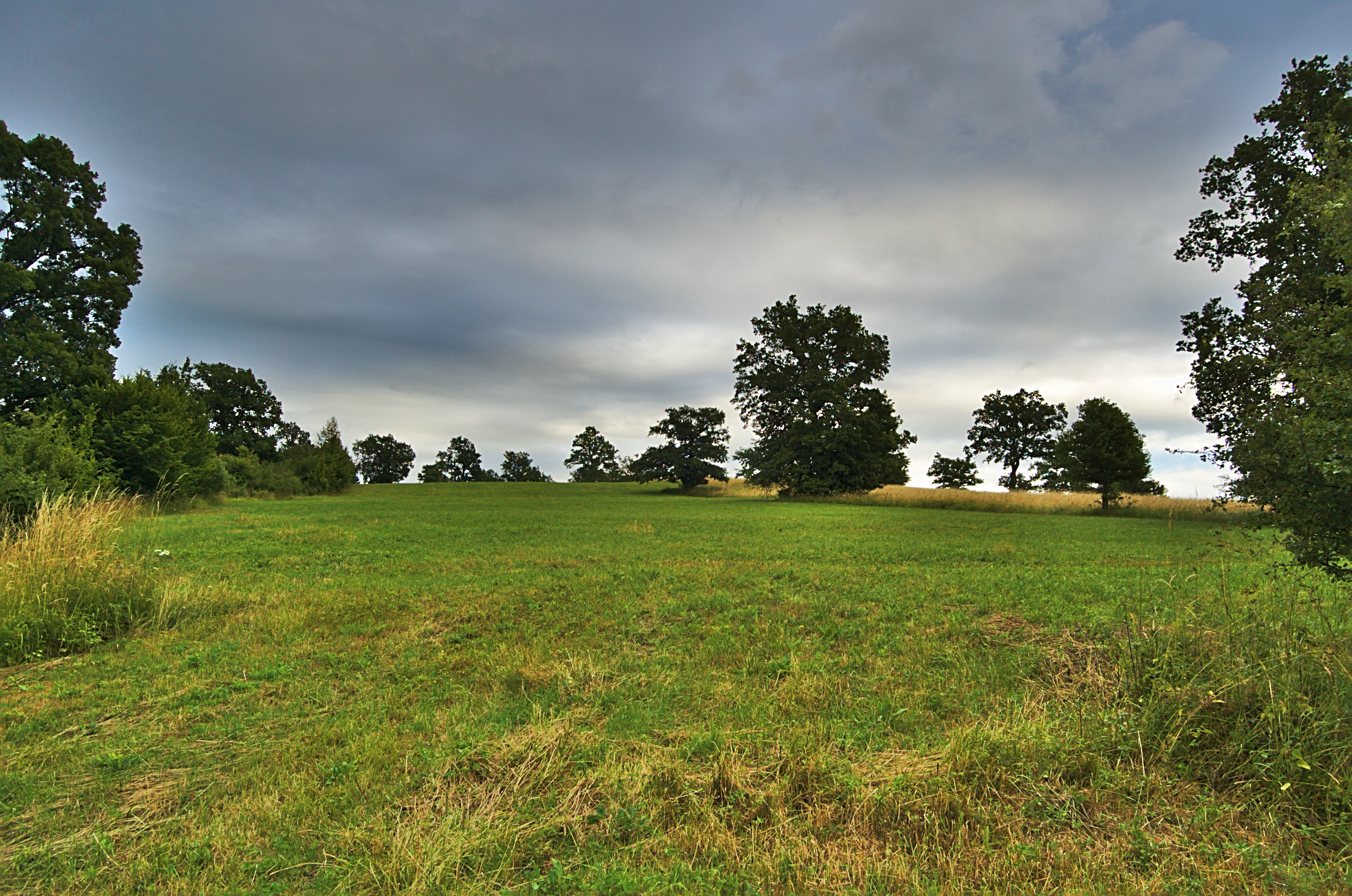 Národní přírodní rezervace Porážky, okresy Hodonín a Uherské Hradiště